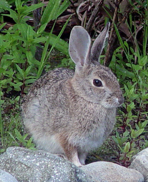 Desert Cottontail (Sylvilagus audubonii)